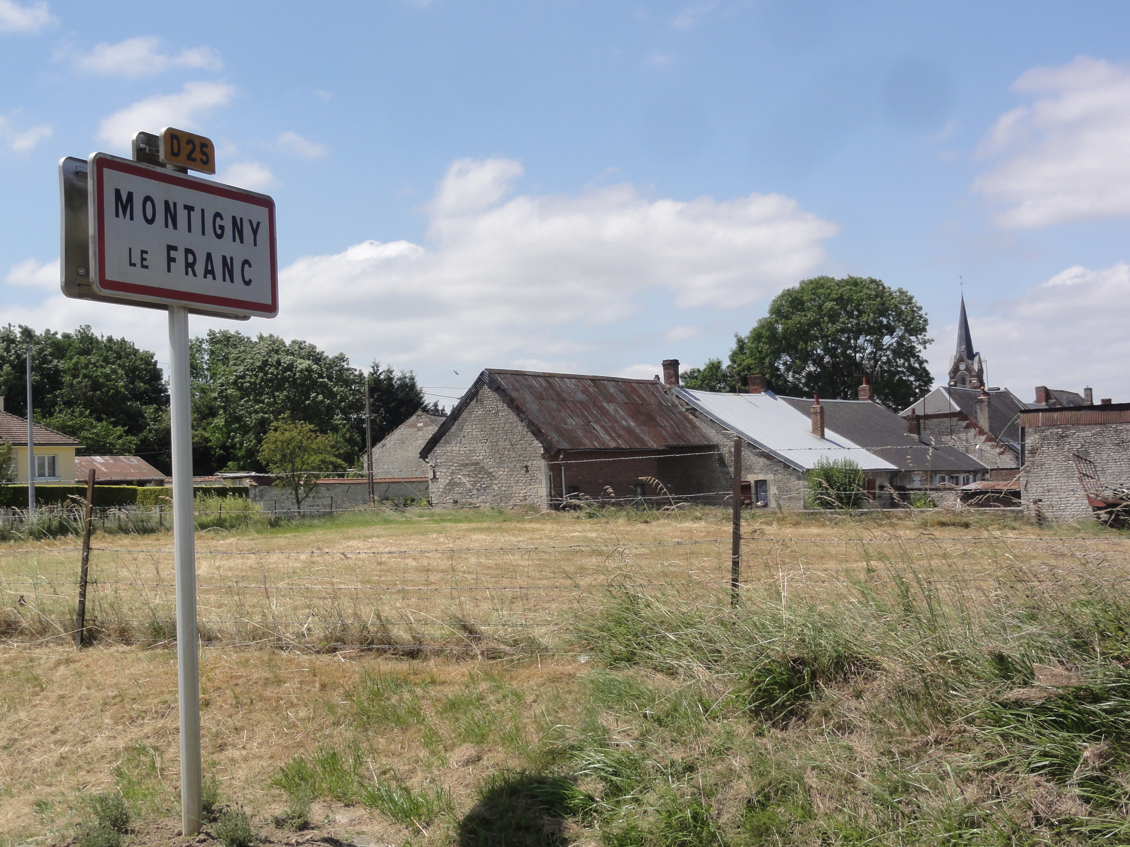 Montigny-le-Franc (Aisne) city limit sign